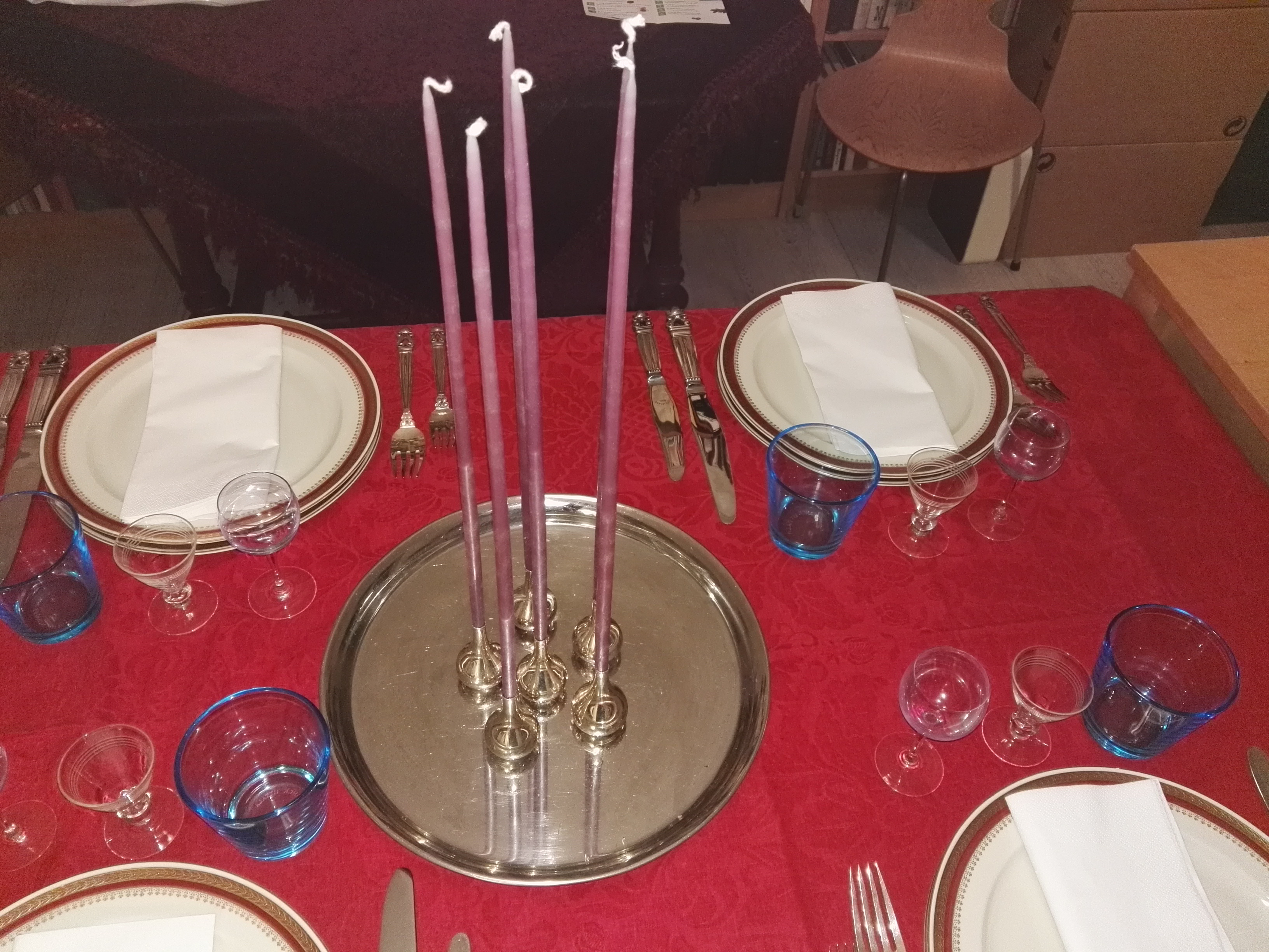 Borddækning med Jens Harald Quistgaards lysestager i messing, Dansk Design 1956.